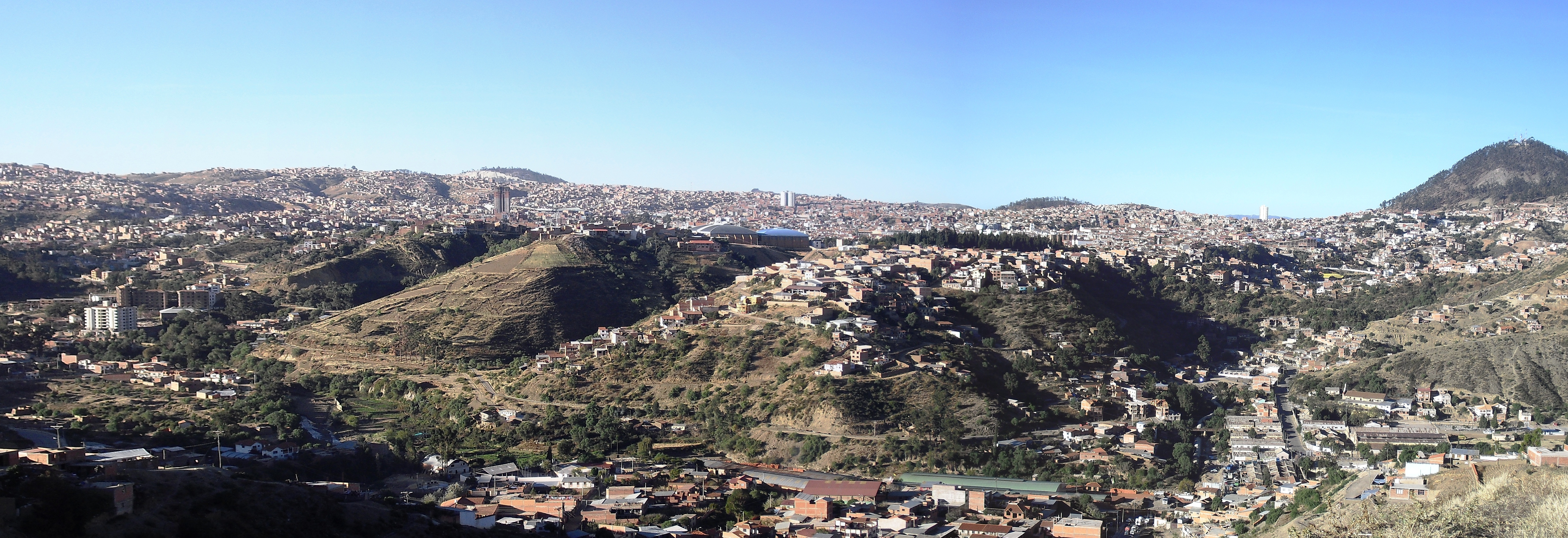 Sucre experimentó un fuerte crecimiento poblacional en las ultimas décadas, producto de ello es la creciente mancha Urbana que va expandiendose sobre las colinas sucrenses, Actualmente La ciudad experimenta un "boom" inmobiliario, ahora cuenta con altos edificios que se elevan en los alrededores de la Urbe Capitalina